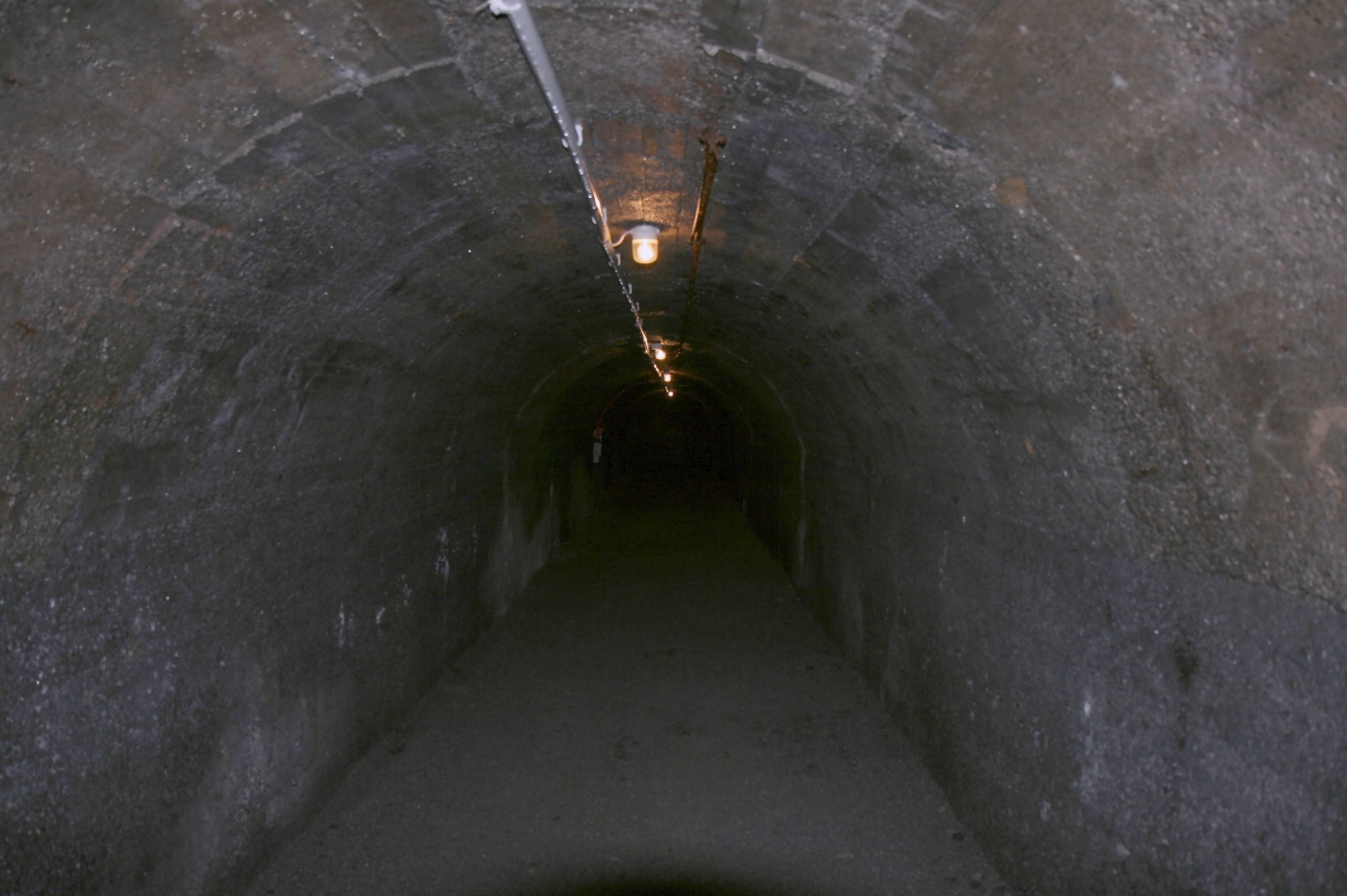 Luftschutzstollen aus dem Zweiten Weltkrieg in der Altstadt von Iserlohn.